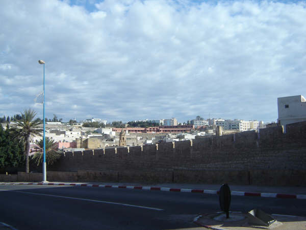 c'est La muraille portugaise qui entoure l'ancienne medina de Safi.